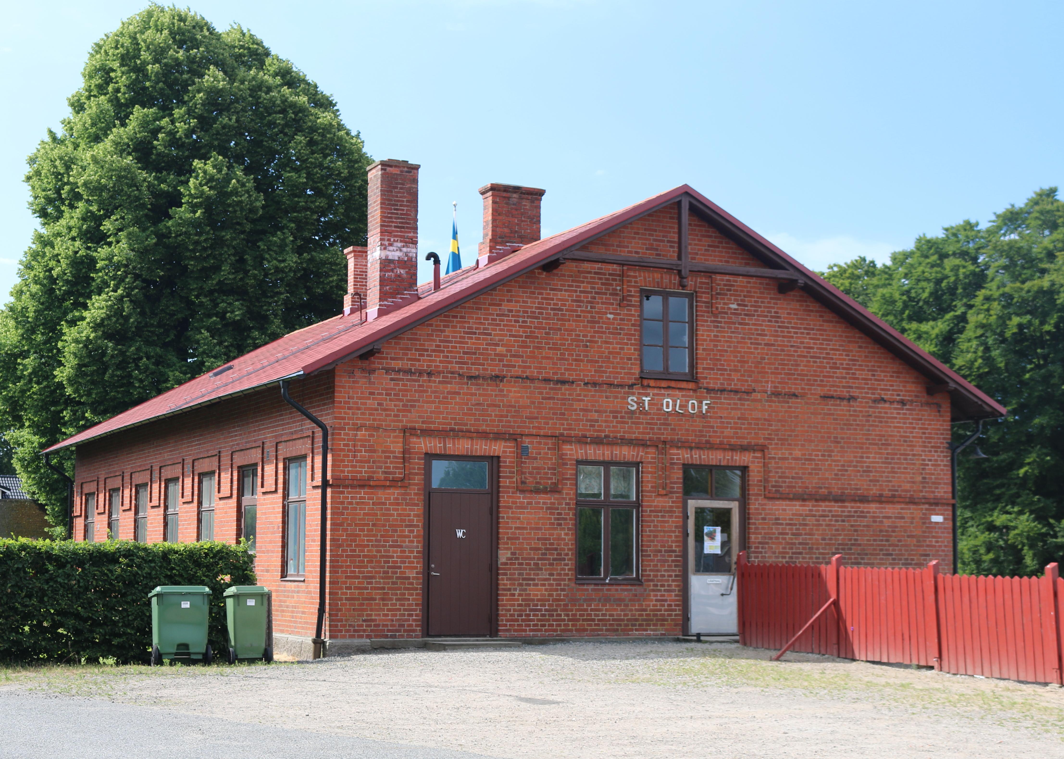 Sankt Olofs station